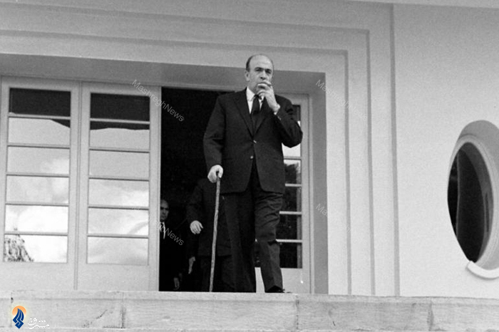 امیرعباس هویدا در قصر